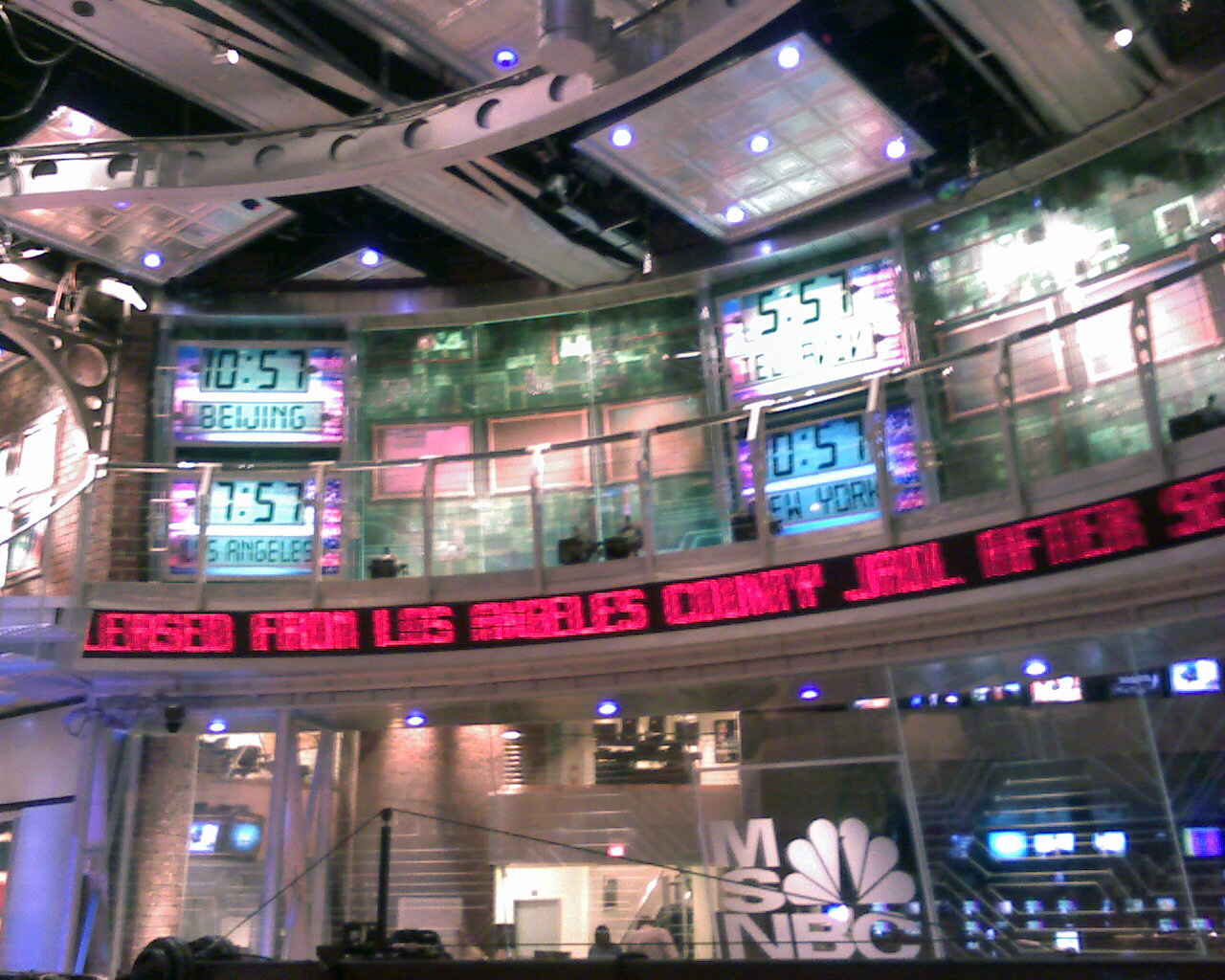 MSNBC NJ HQ